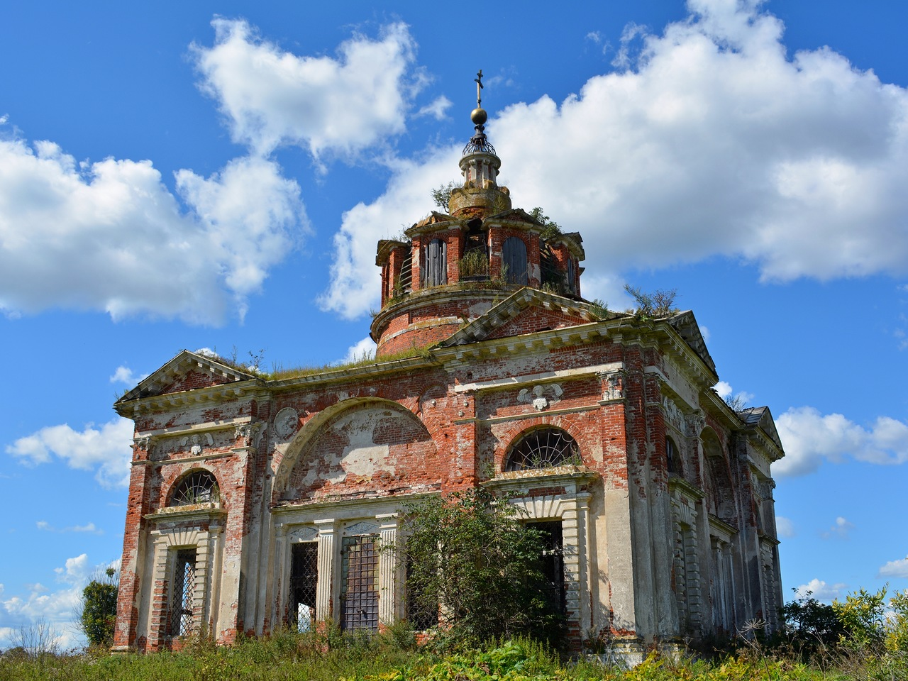 Церковь рождества богородицы с живописью (Тверская область, Кашин, село салтыково)